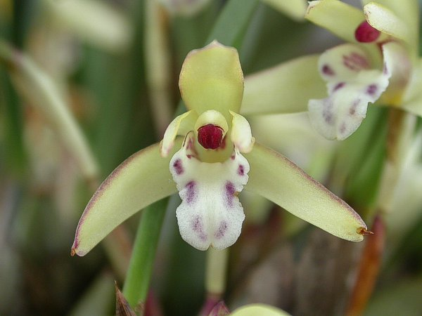 Brasiliorchis gracilis